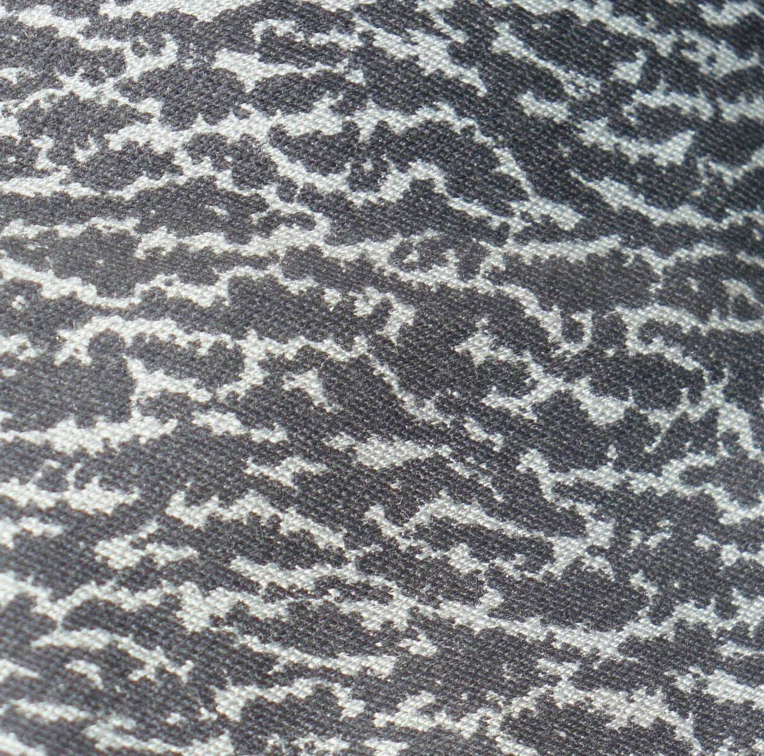 Tkanina z nadrukiem mora Straży Pożarnej